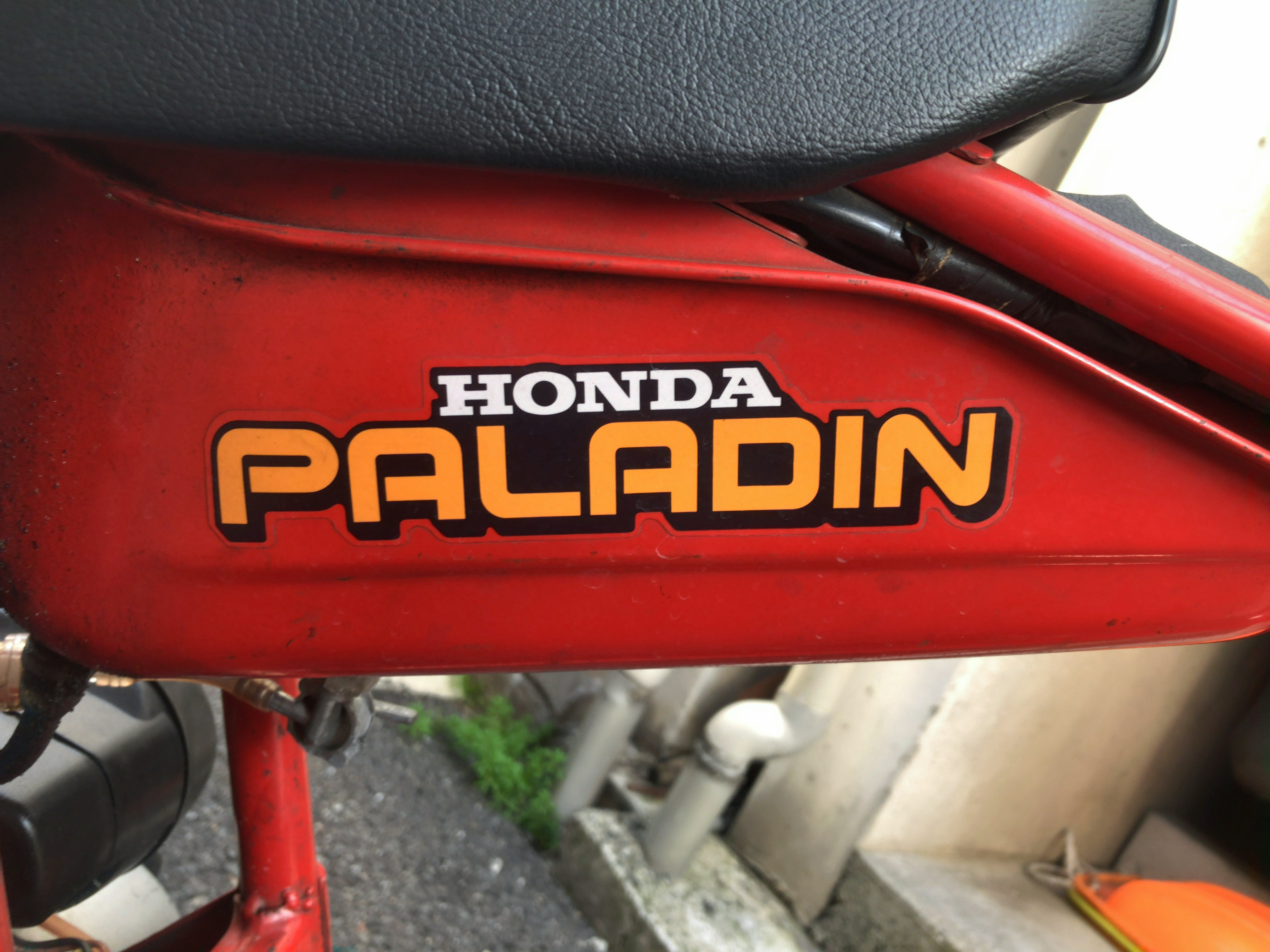 パルディンのロゴ